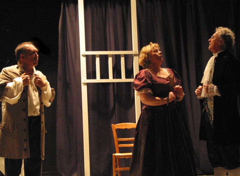 "George Dandin" de Molière monté par l'association "Théatrémolo" de Saint Philbert de Grand Lieu en 2006. Scène issu de l'acte I où Dandin (à gauche) essaye de convaincre ses beaux parents que sa femme le déshonore. Photo prise et difusée par un menbre de l'association avec le consentement de cette dernière.